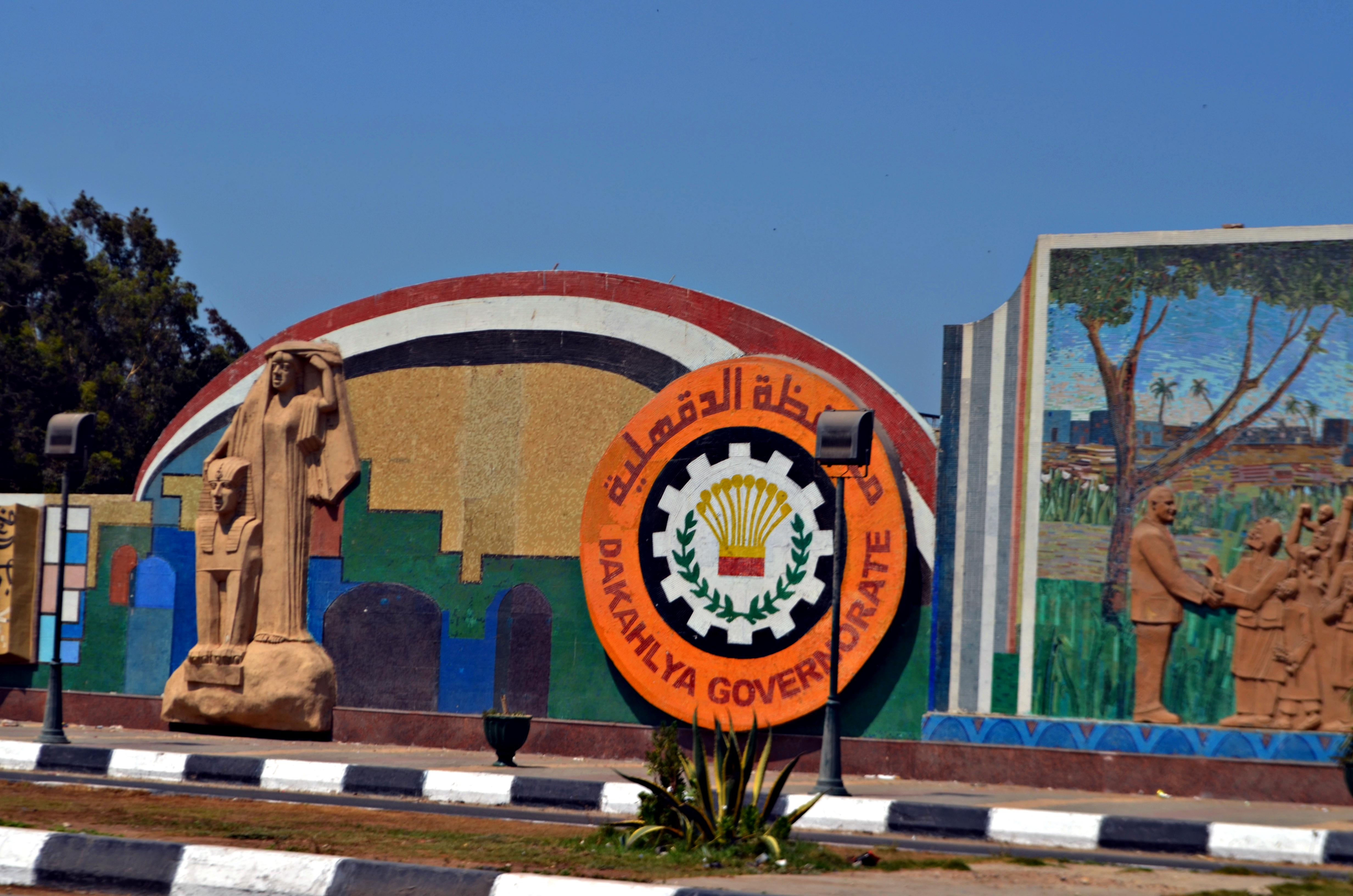 جداريات بمدينة المنصورة، محافظة الدقهلية، مصر